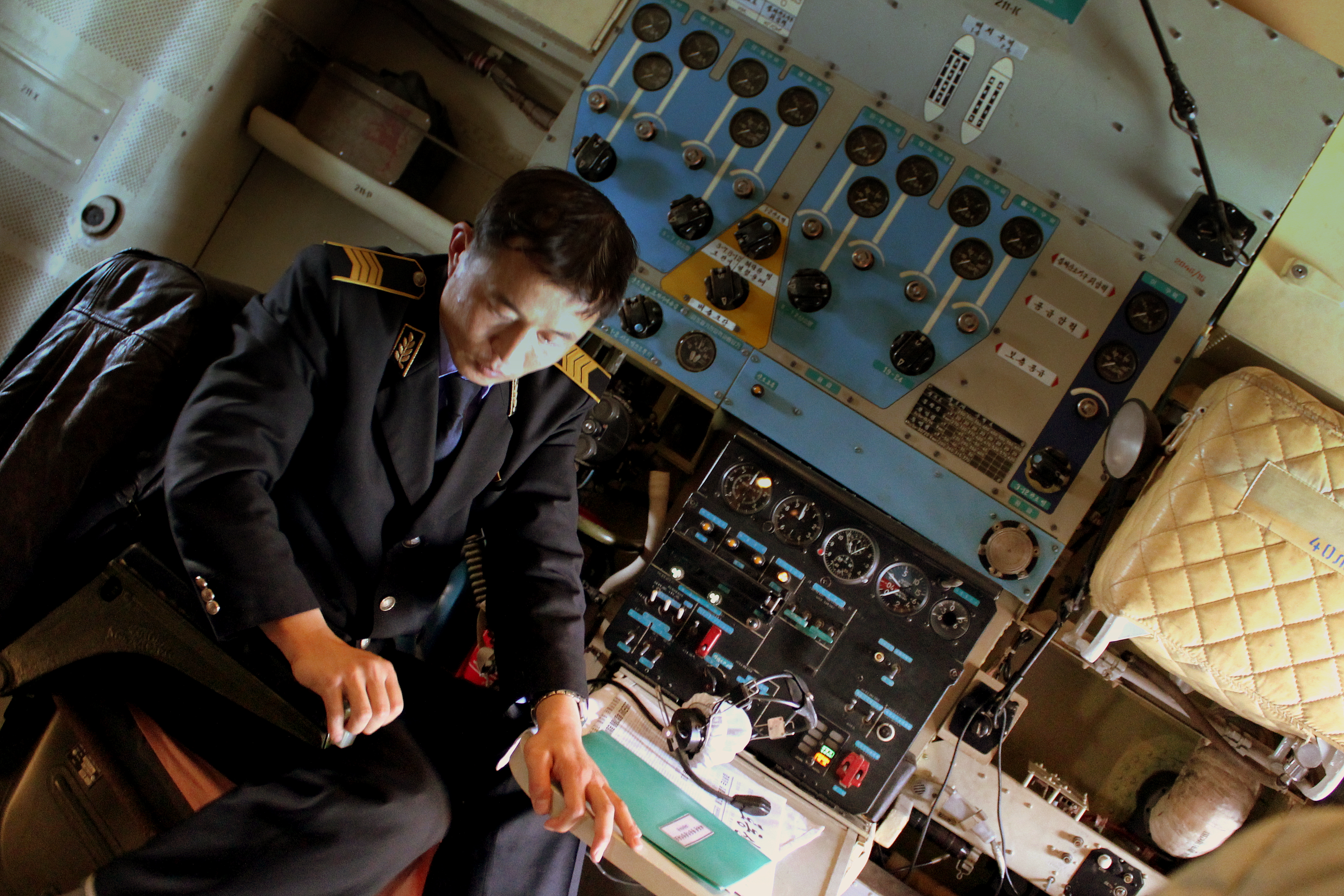 AIR KORYO FLIGHT JS5105 P-912 IL76 LOADMASTER POSITION FROM PYONGYANG SUNAN TO HAMHUNG SONDOK AIRFIELD DPR KOREA OCT 2012